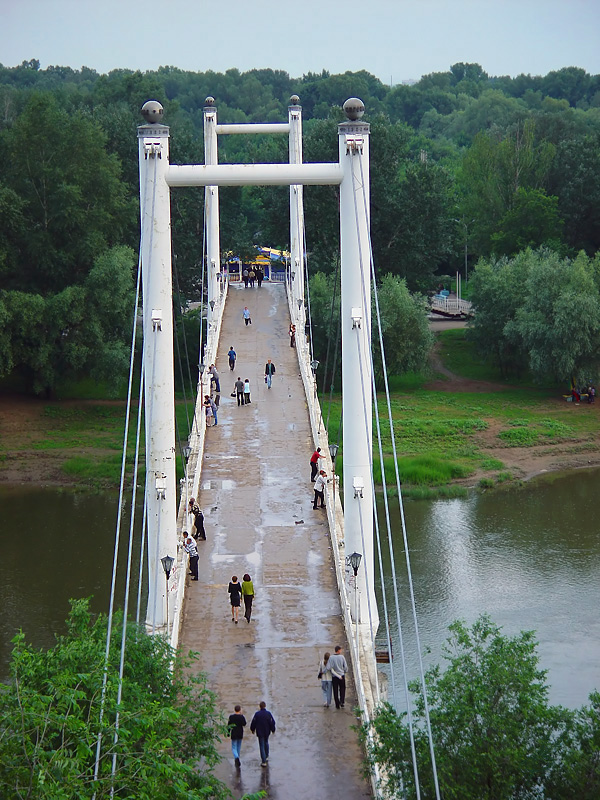 Pedestrian bridge in Orenburg. Russia.